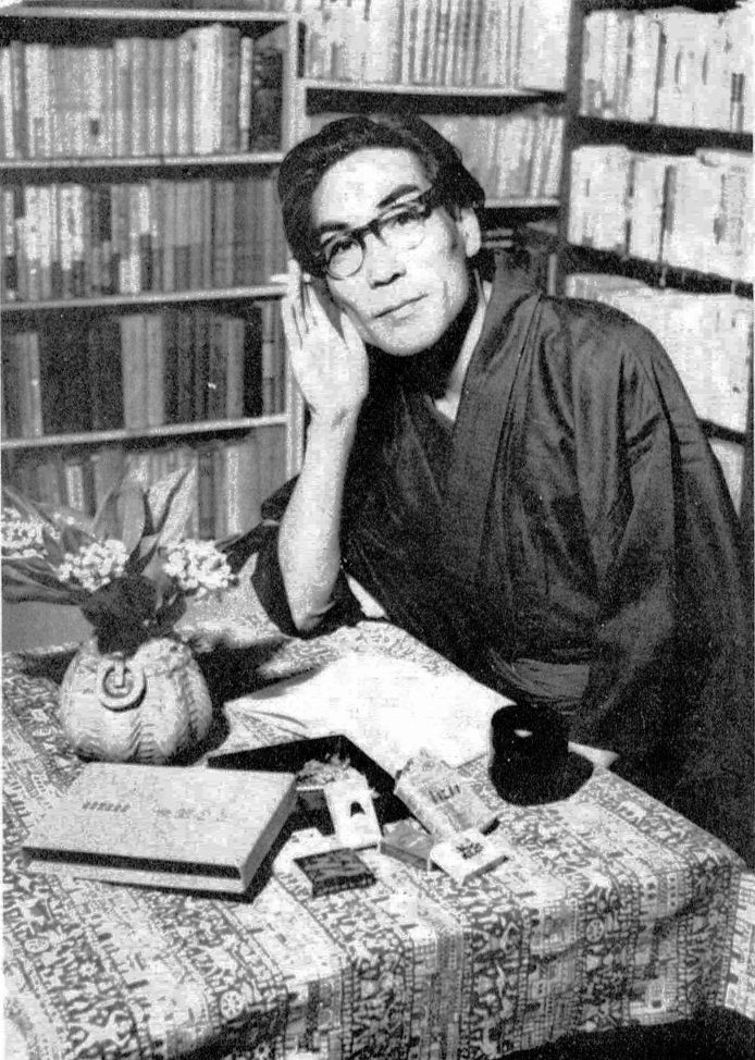 河出書房社『女 : 小説集』（1956）より八木義徳